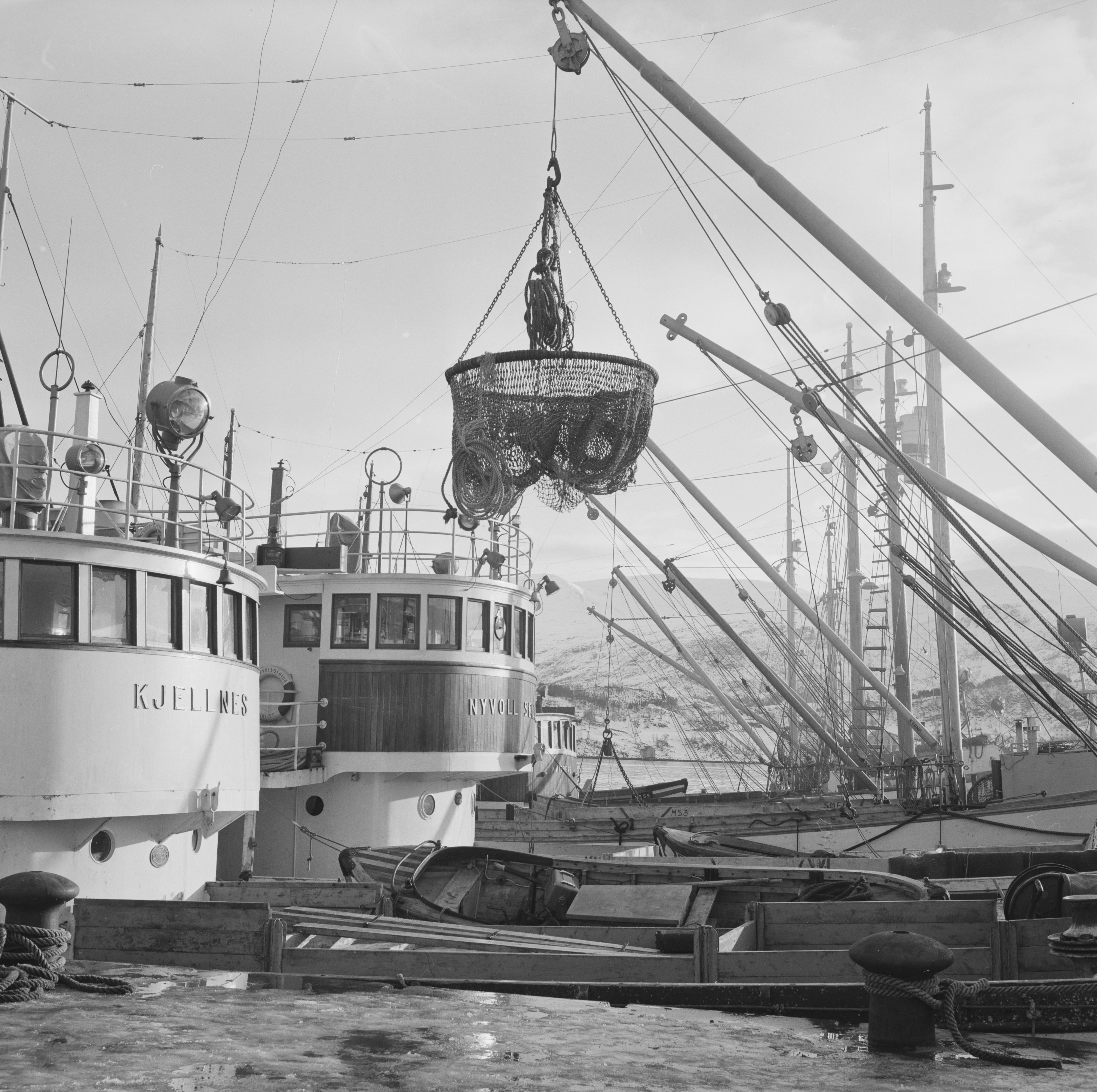 Bildet er hentet fra Nasjonalbibliotekets bildesamling Ålesund, Ålesund, Møre og Romsdal